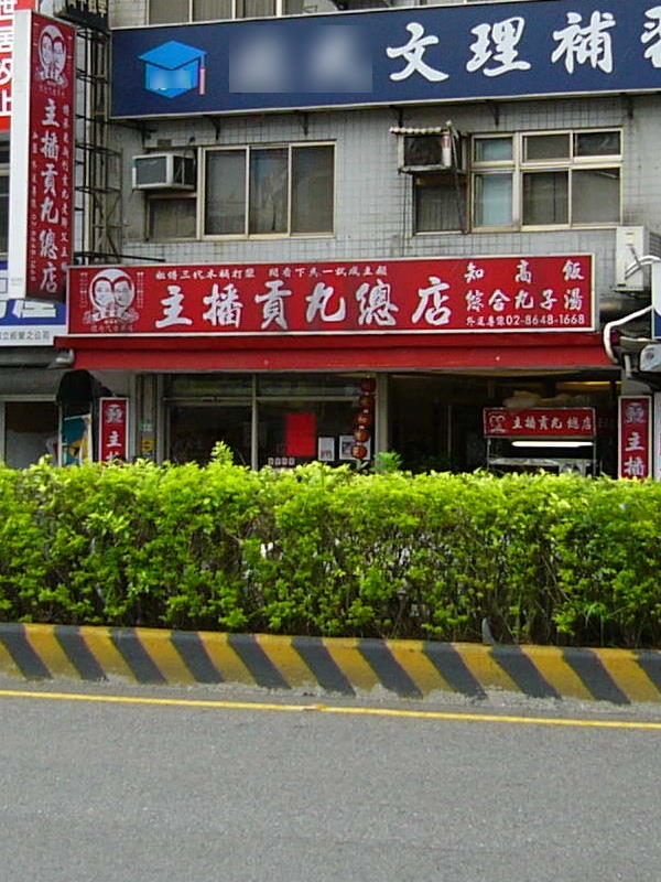 中文（台灣）: 前三立電視主播楊中化開的「主播貢丸」總店，2010年時位於台灣台北縣汐止市大同路二段。